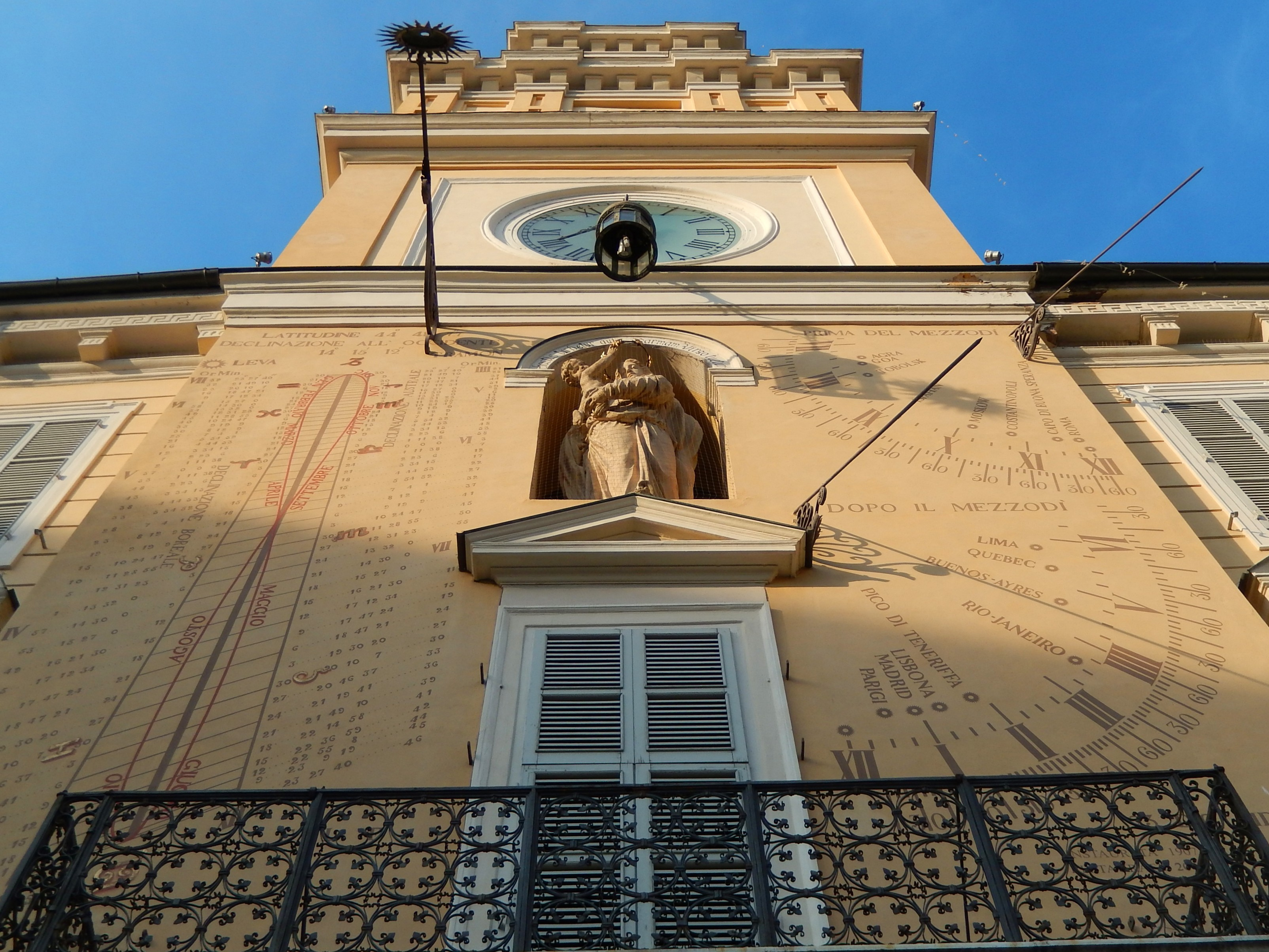 Palazzo del Governatore, Parma: torre This is a photo of a monument which is part of cultural heritage of Italy.